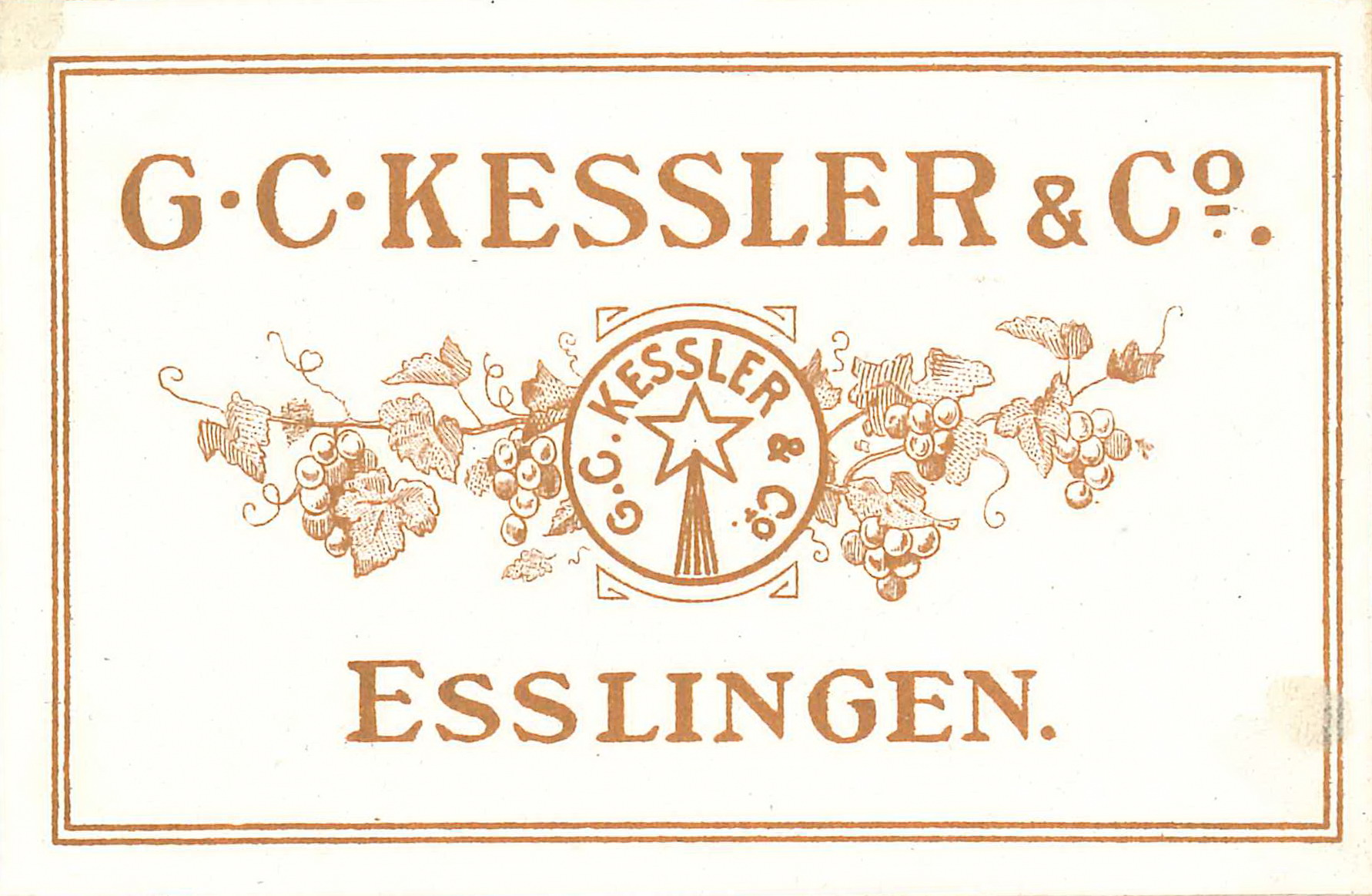 Historisches Kessler-Etikett (um 1914) für Piccolo-Flaschen mit dem Großen Komet von 1811